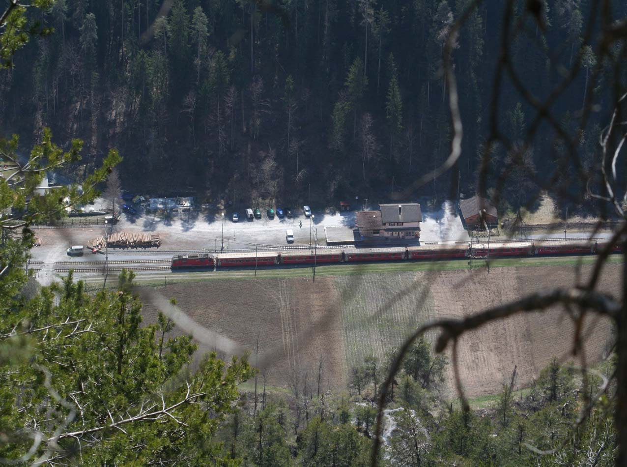 Versam Station